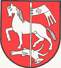 Wappen der Gemeinde Sankt Georgen ob Judenburg in Österreich